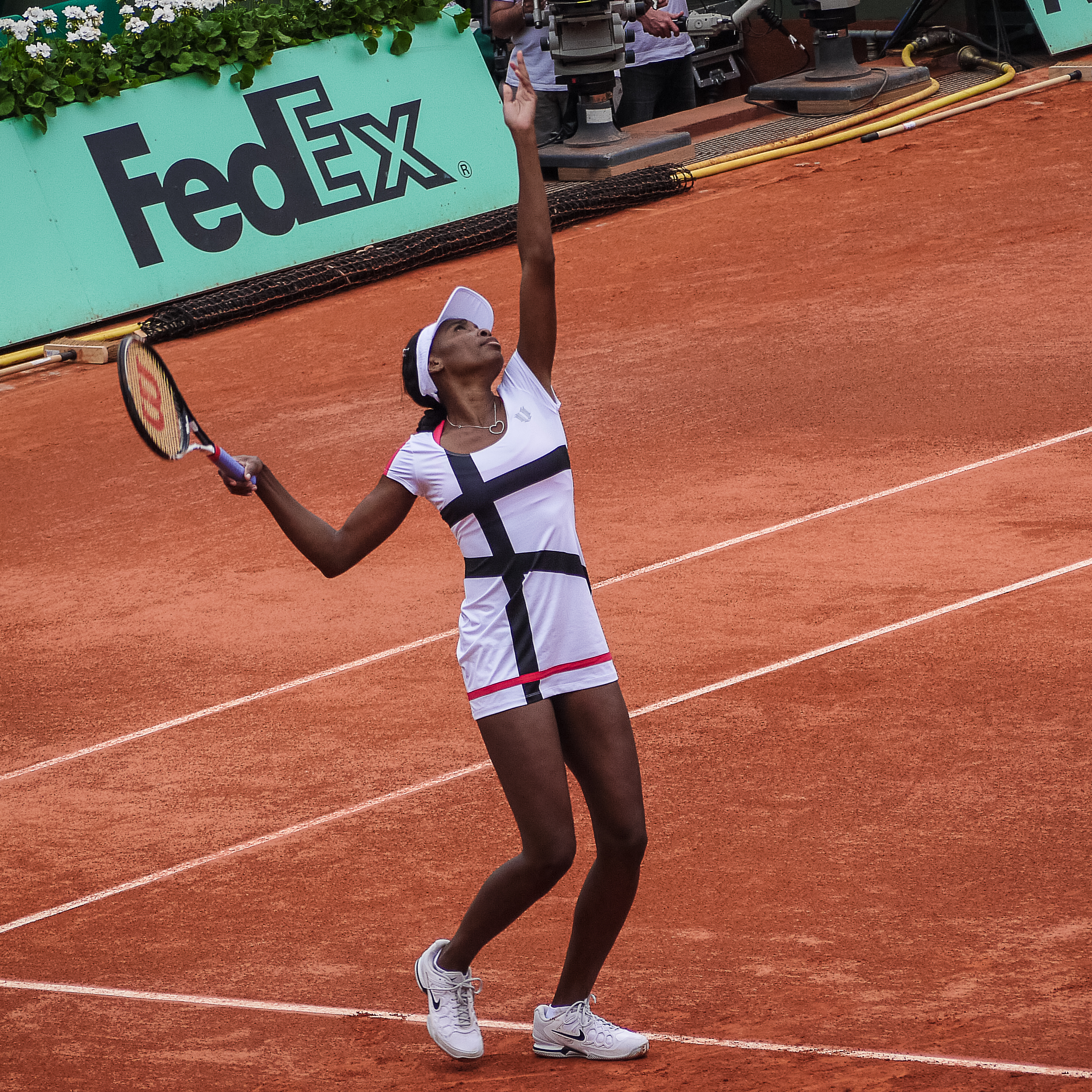 2ème tour Roland Garros 2012 : Agnieszka Radwanska (POL) def. Venus Williams (USA)